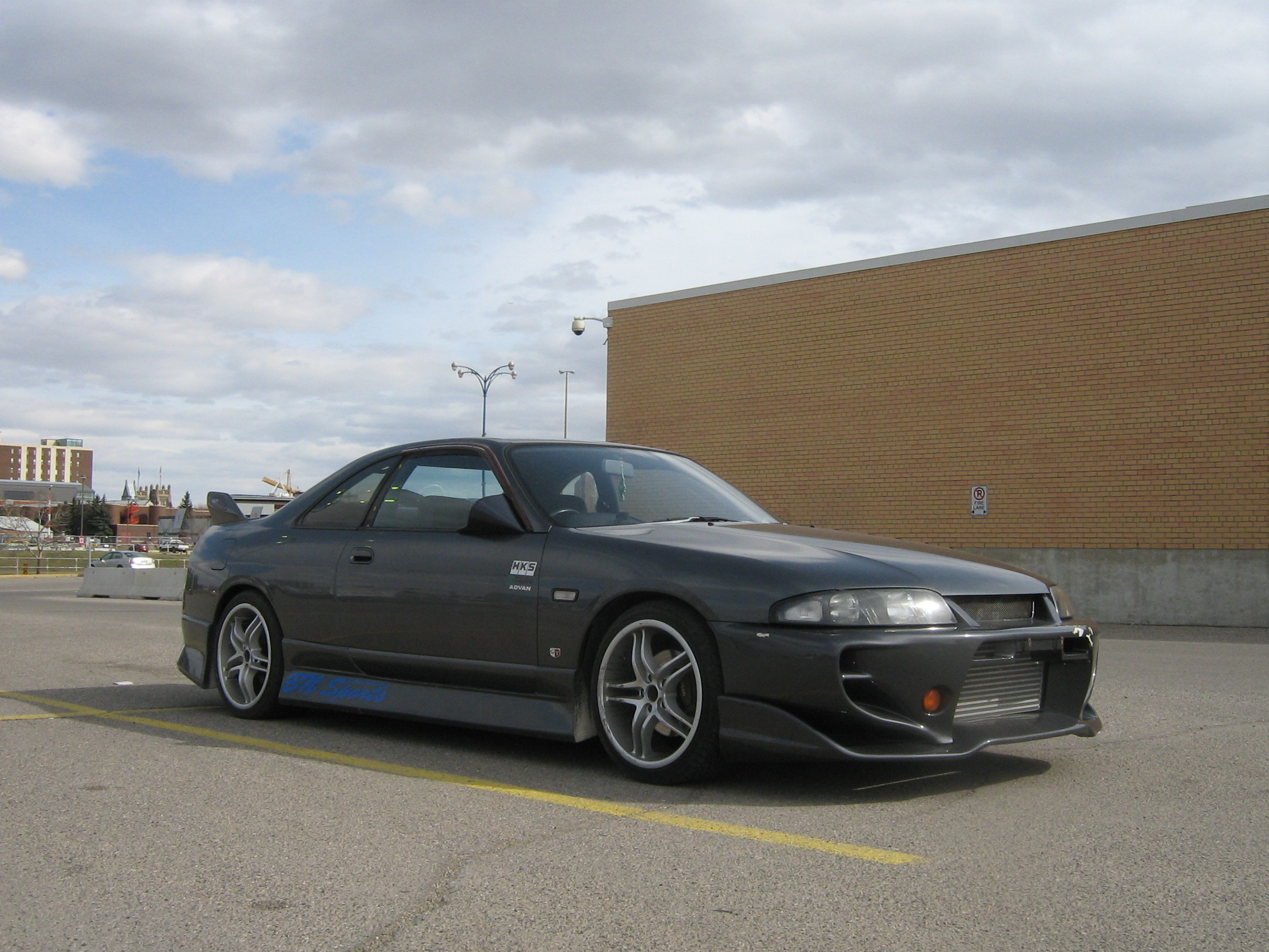 Nissan Skyline GTS-T